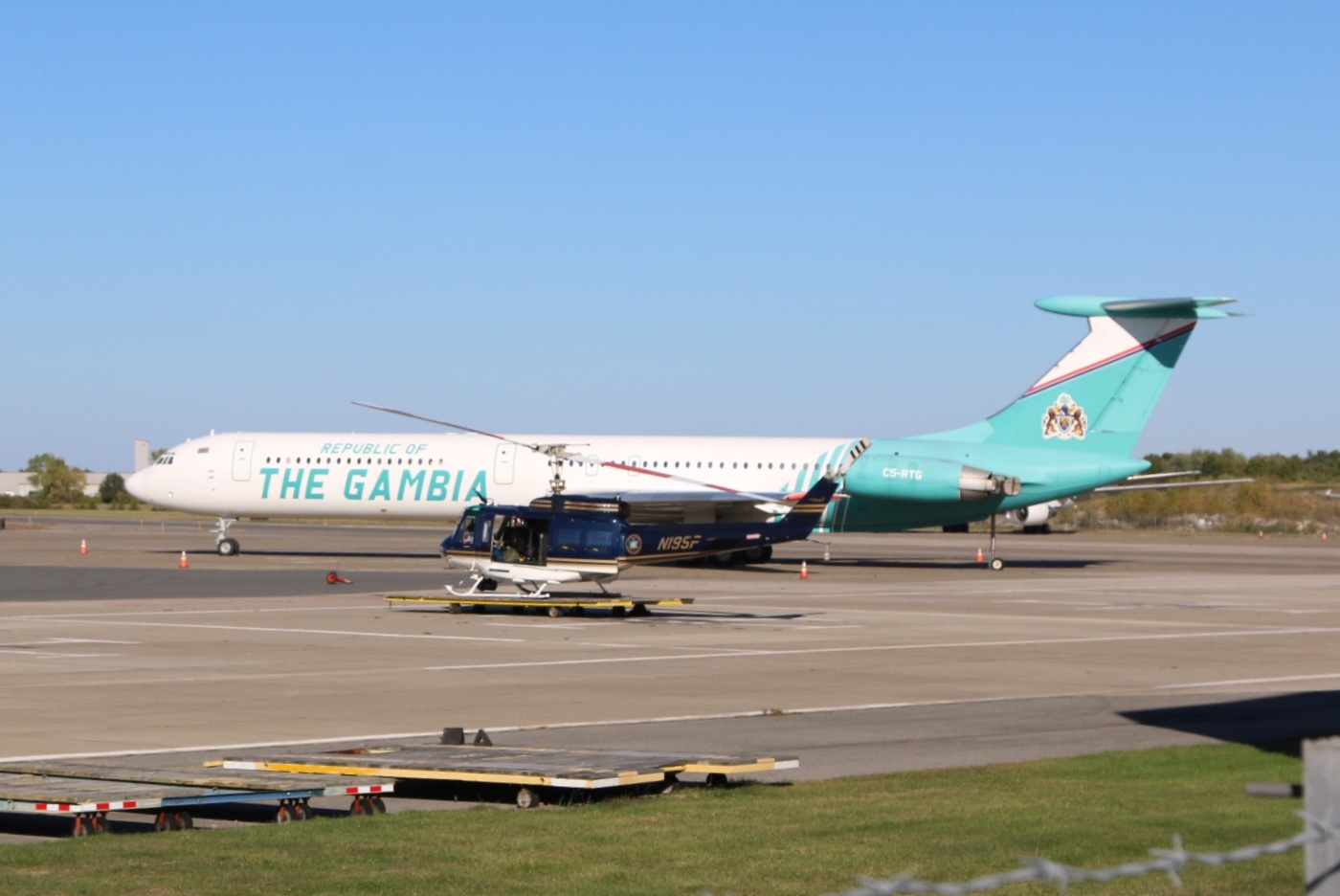 C5-RTG At SWF